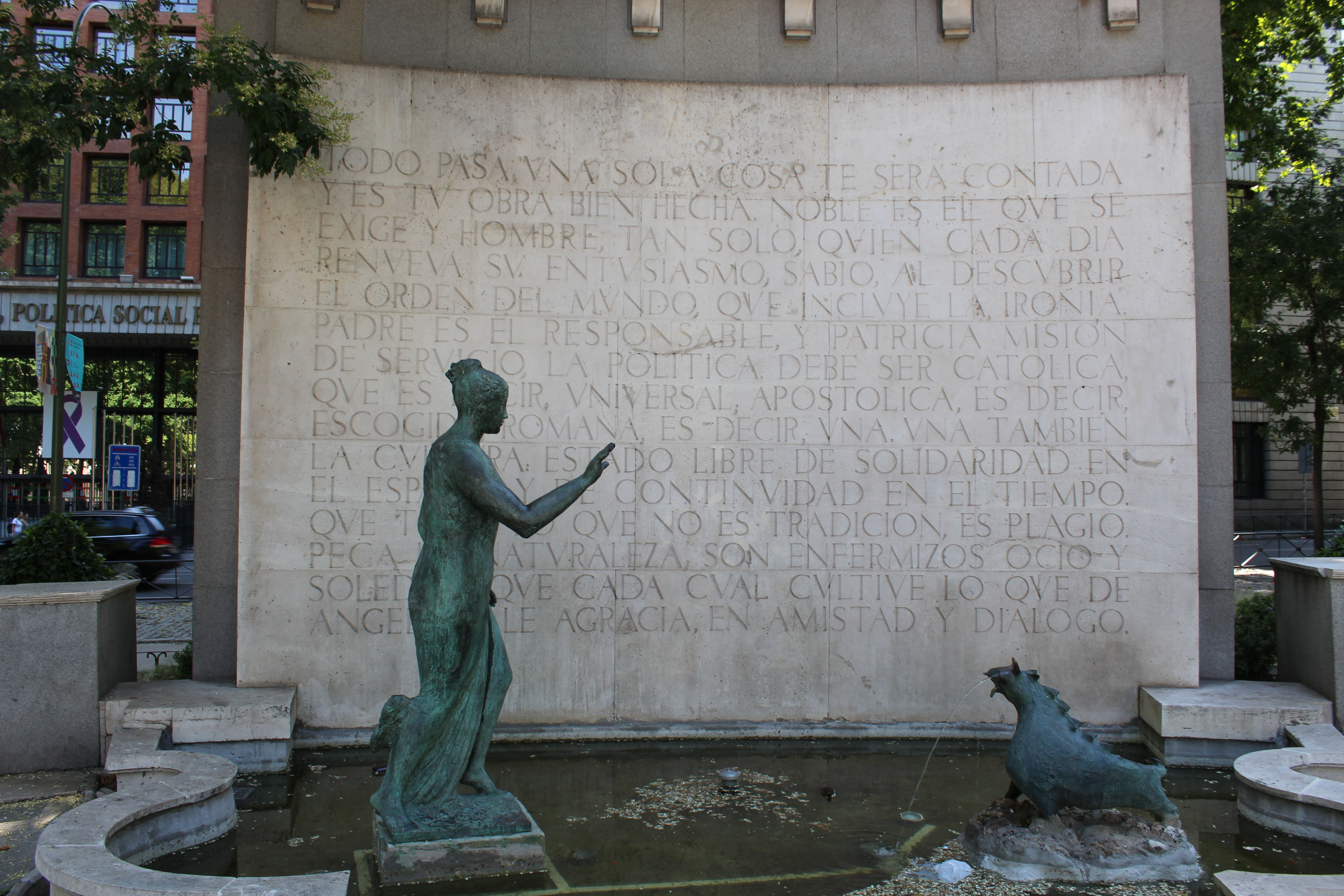 Monumento a Eugenio D'Ors, Paseo del Prado, Madrid